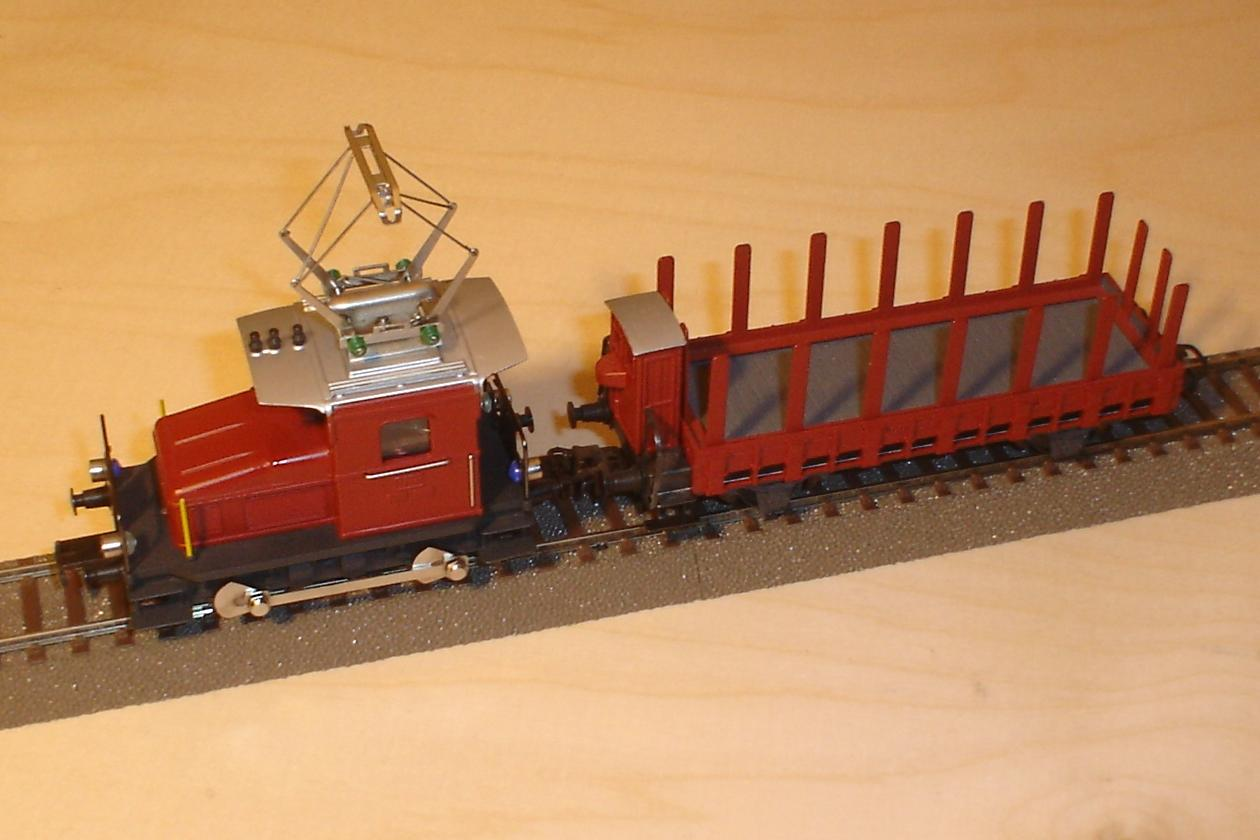 Rangiertraktor Te 2/2 IIIund SBB 2-achsiger Niederbordwagen mit Rungen und Bremserhaus in brauner Farbe mit der Spur H0 des Schweizerischen Modelleisenbahnherstellers HAG. Die Modelleisenbahn Fahrzeuge für das Zweileiter-Gleichstrom Gleissystem sind in vollständiger Metallbauweise. Robust und Langlebig. Ein noch Heute (Stand 2009) gültiges Merkmal der Fahrzeugmodelle von HAG. Die Fahrzeuge befinden sich auf Zweileiter Geleisen von Trix (C-Gleis).